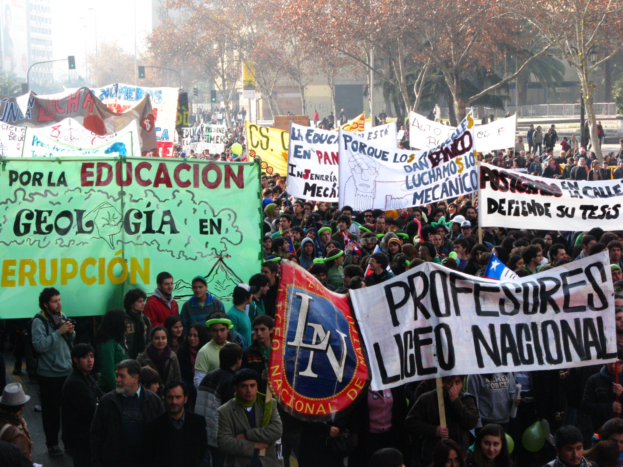 Estudiantes chilenos marchando por la Alameda